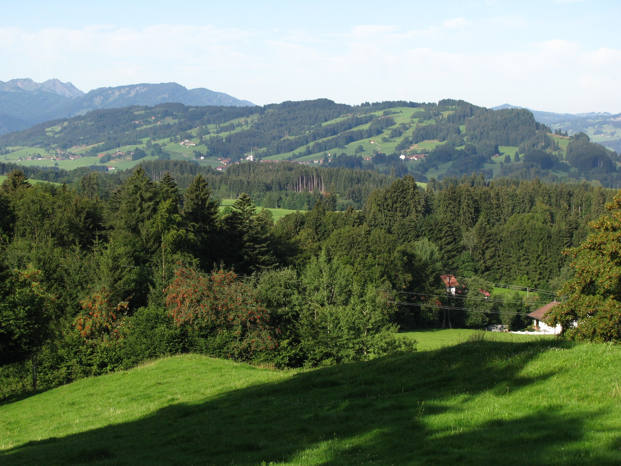 Rottachberg im Oberallgäu von Ostnordost; etwas links der Mitte das Dorf Vorderburg (Kirche mit spitzem Turm); links im Hintergrund die Berge um Immenstadt